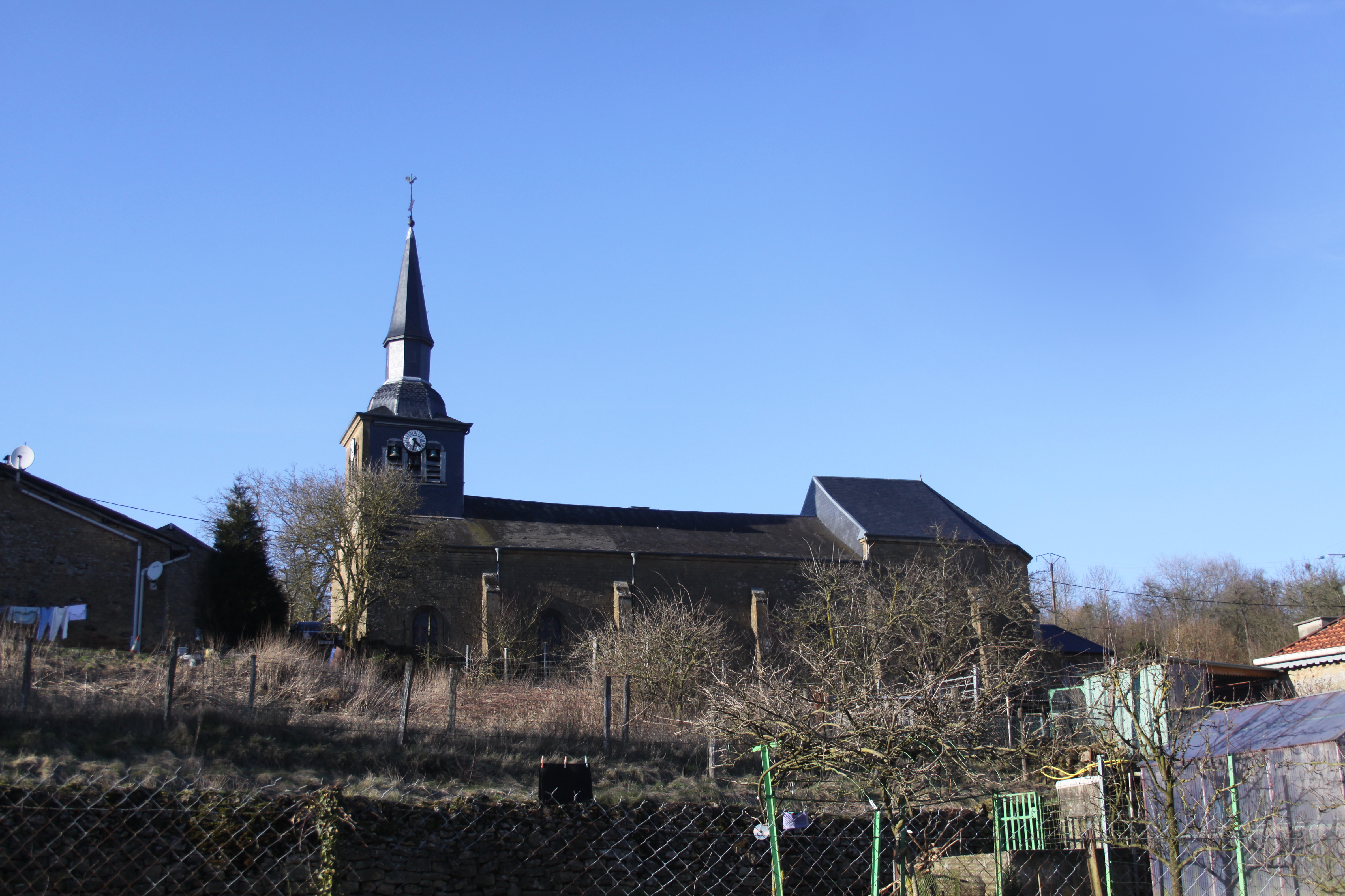 Village Ardennais